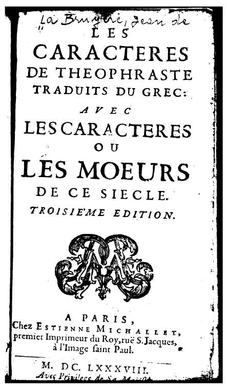 Capture d'écran du *.pdf de la troisième édition des Caractères de La Bruyère proposé par Gallica, la bibliothèque numérique de la BNF.